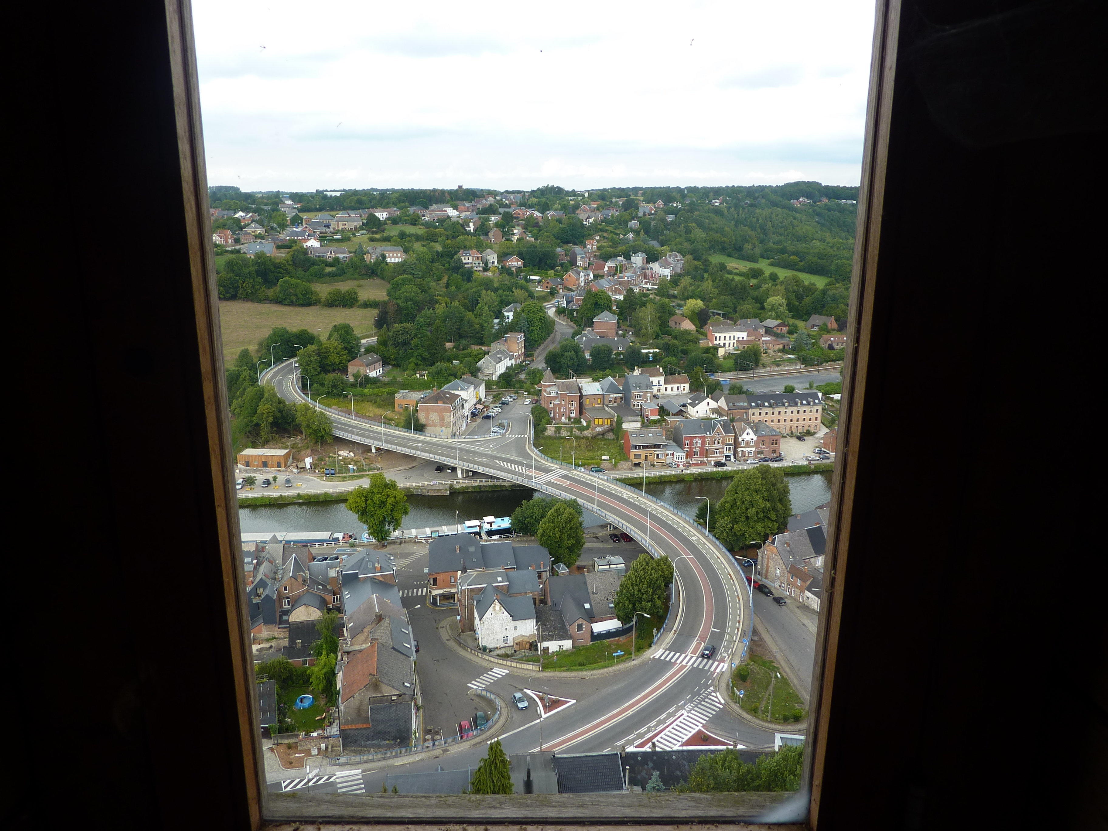 La ville-basse vue du Beffroi de Thuin, Bruxelles, Belgique.